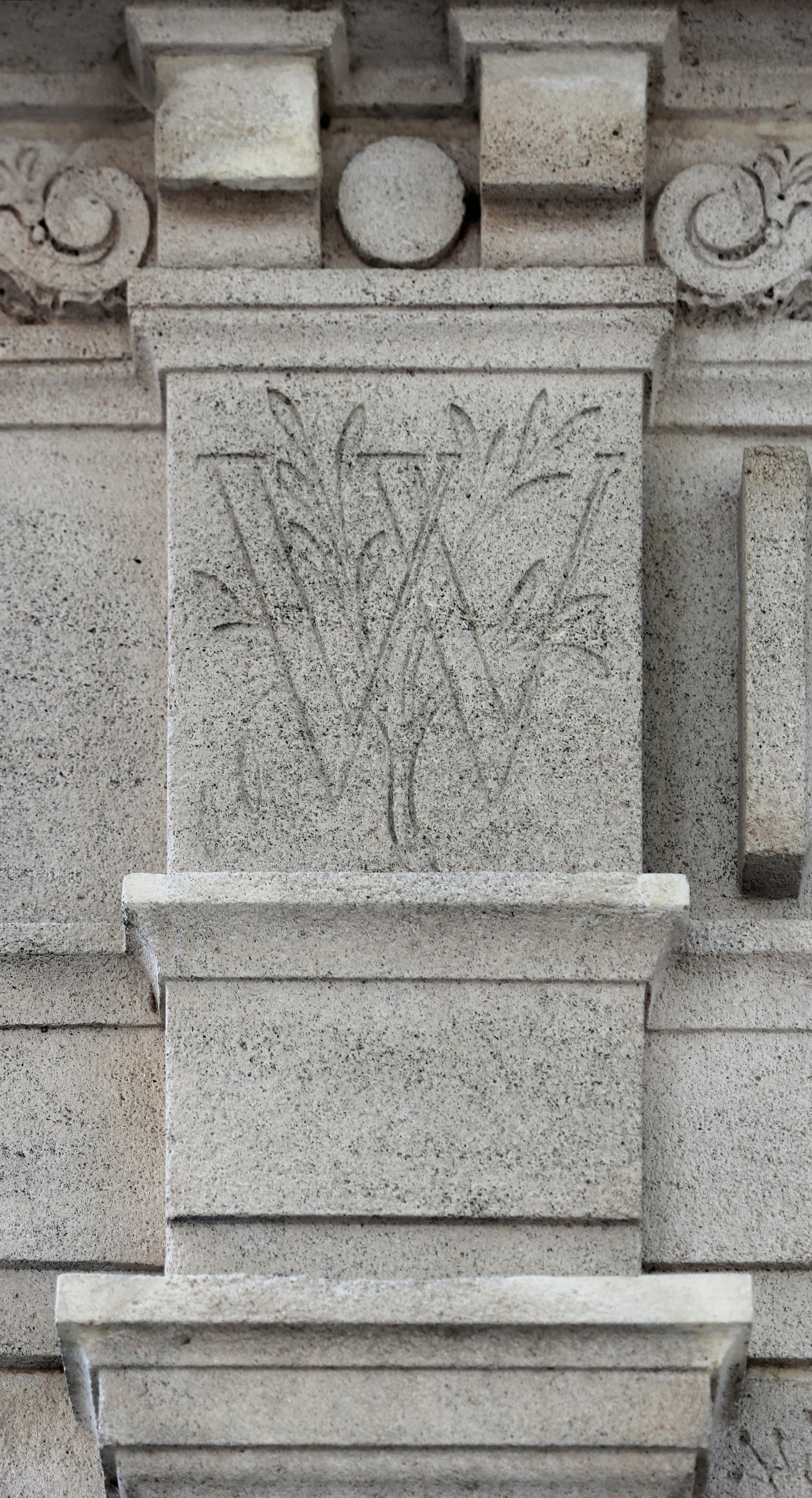 Chapelle en forme de temple grec aptère d'ordre indéterminé. Le fronton porte le blason (d'azur à la colonne d'or, sommée d'une couronne du même) de Walewski. Le pronaos in antis est fermé par une grille métallique basse. La porte du naos est attique, avec un entablement sur consoles.À l'intérieur, portrait en médaillon d'Alexandre Walewski sculpté par Alexandre-Victor Lequien